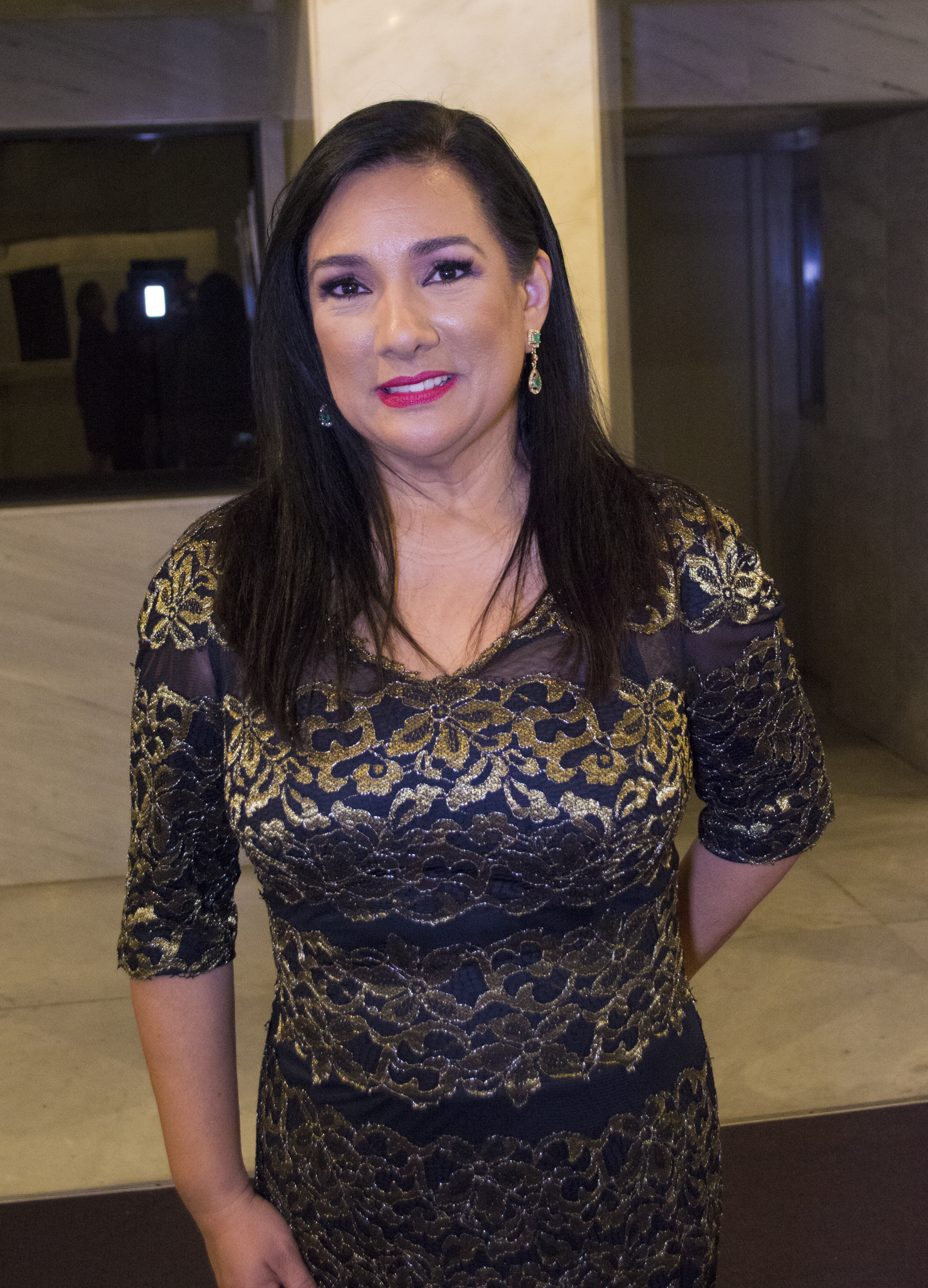 Tania Tinoco en 2016 en los Premios ITV